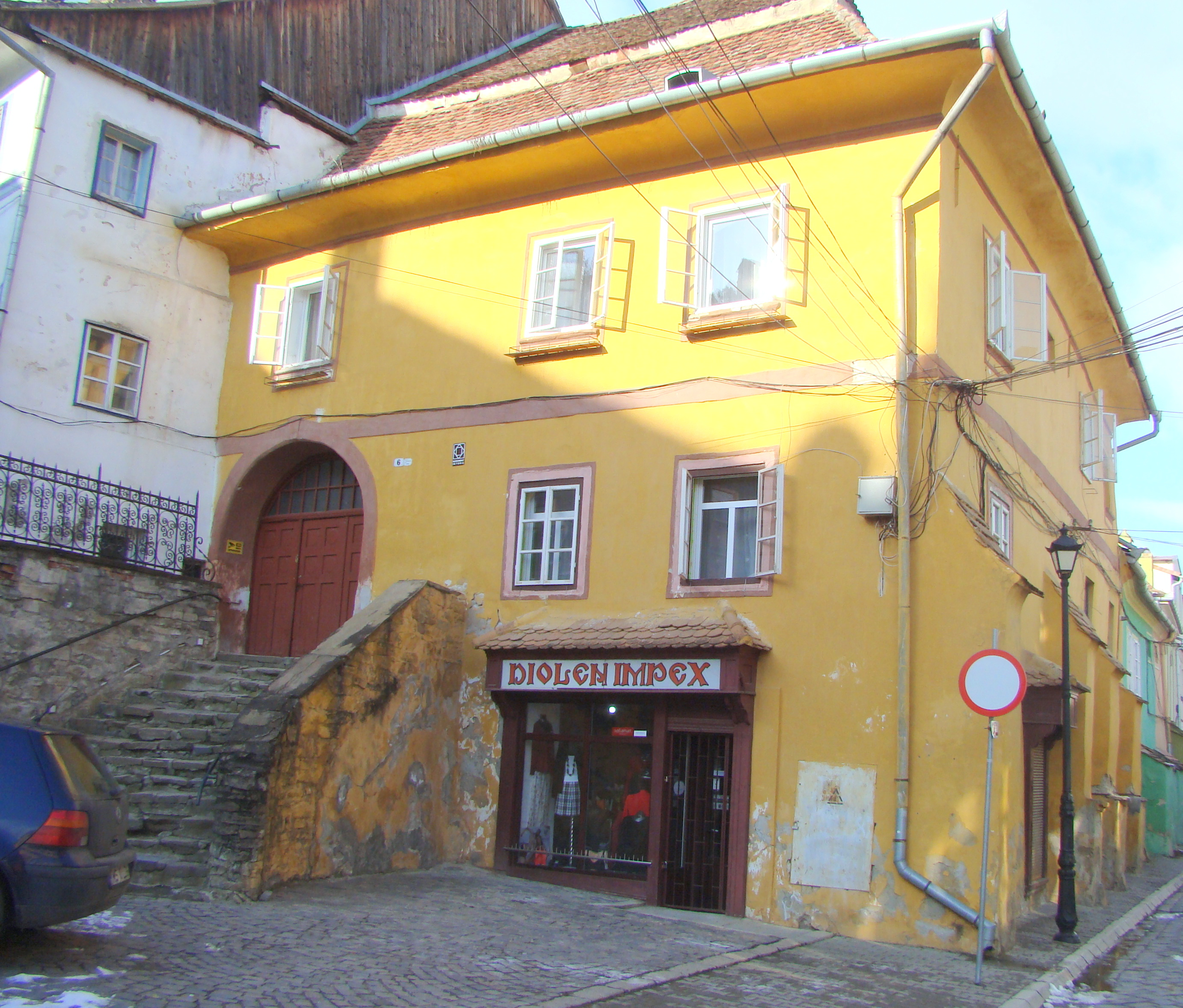 Casa Wultschner, municipiul Sighișoara Piața Oberth Hermann 6 1676, 1700-1750, transf. înc. sec. XIX,1881, 1926